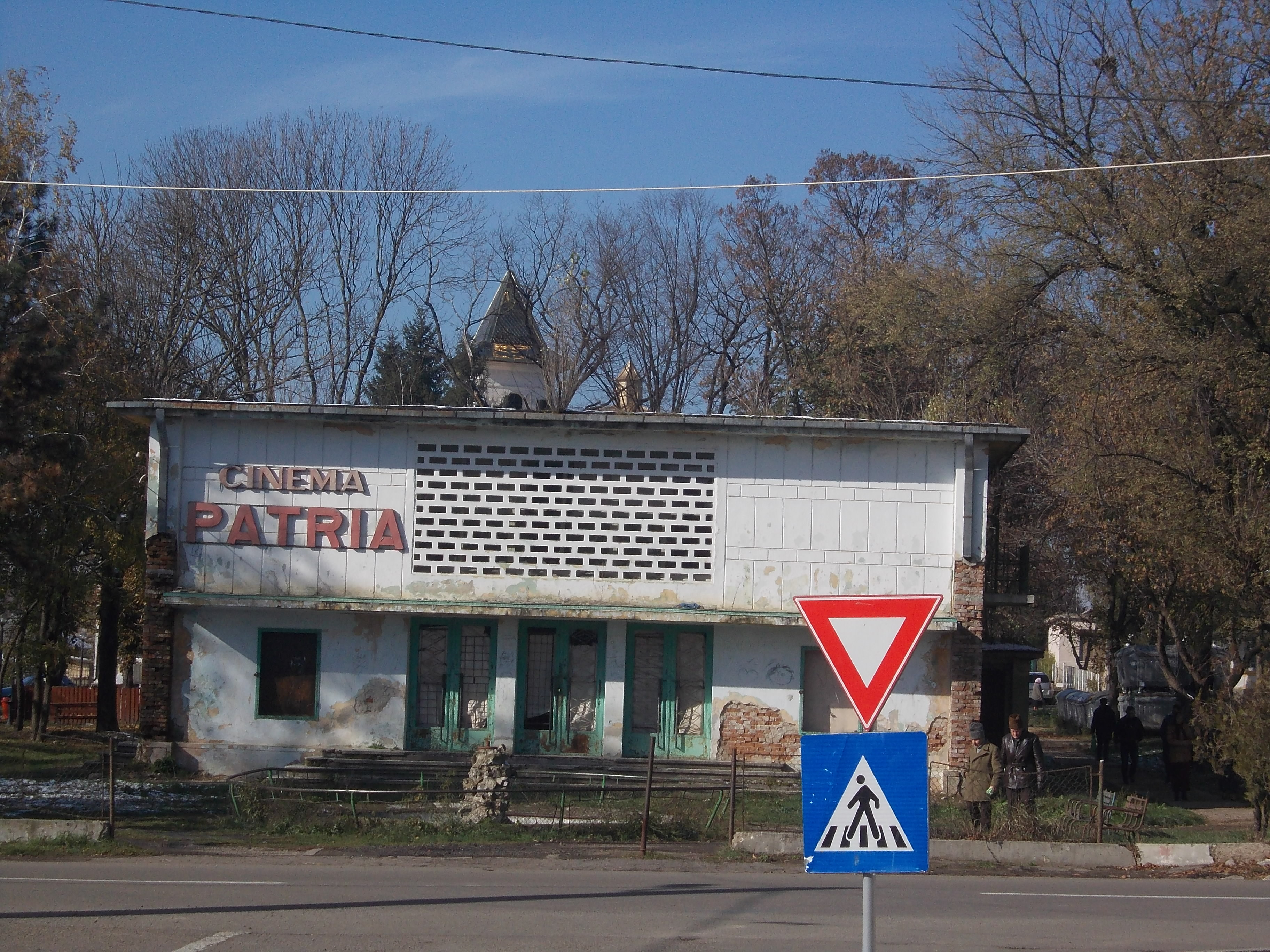 Cinema Patria Săveni